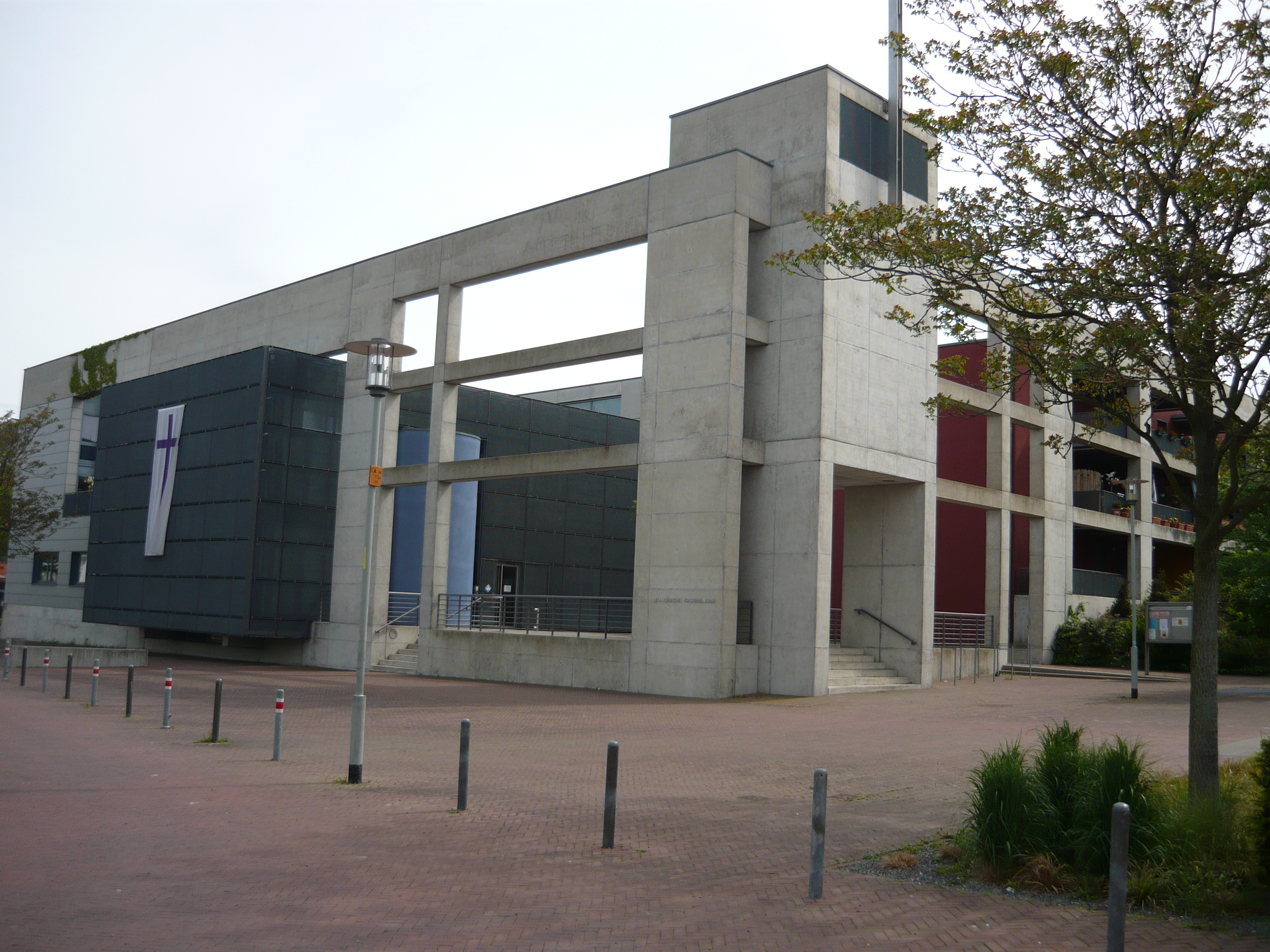 Evangelisches Kirchenzentrum Kronsberg, Mai 2012